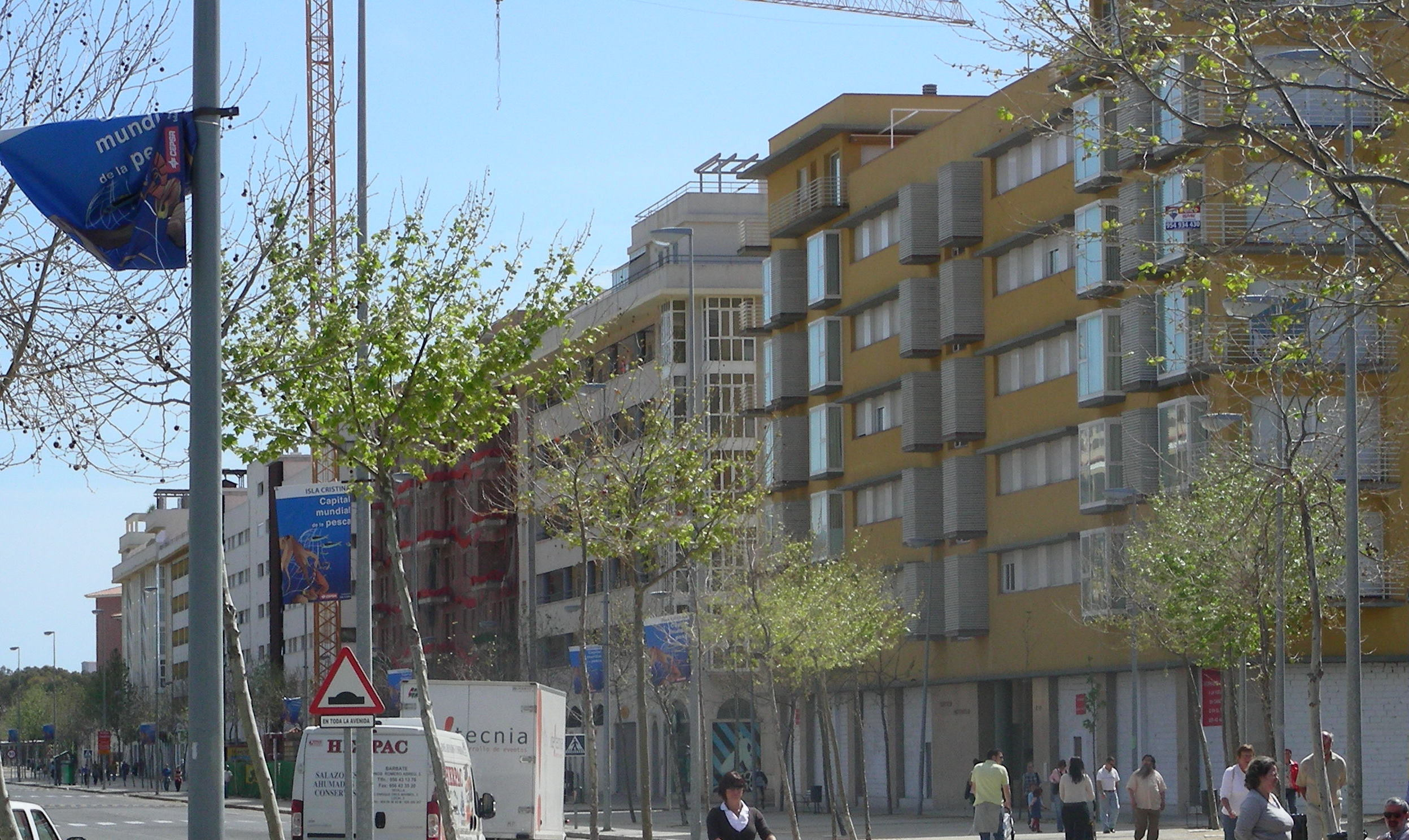 Ensanche de Isla Cristina